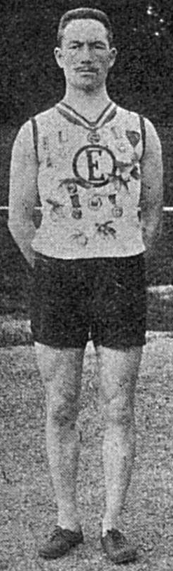 Fredrik Svanström, Finnish middle-distance runner, circa 1908